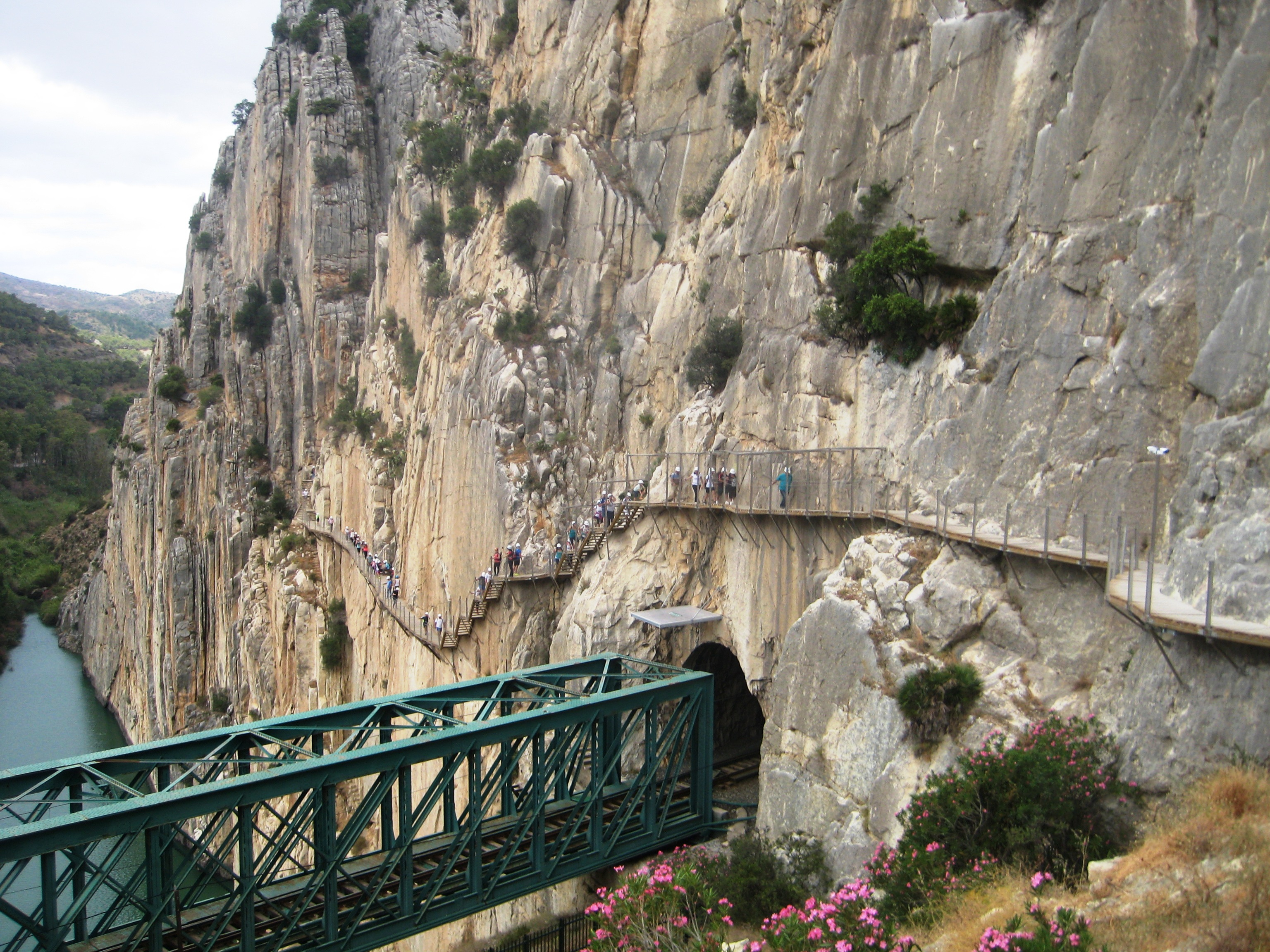 El tren Málaga-Córdoba atraviesa ese paraje.